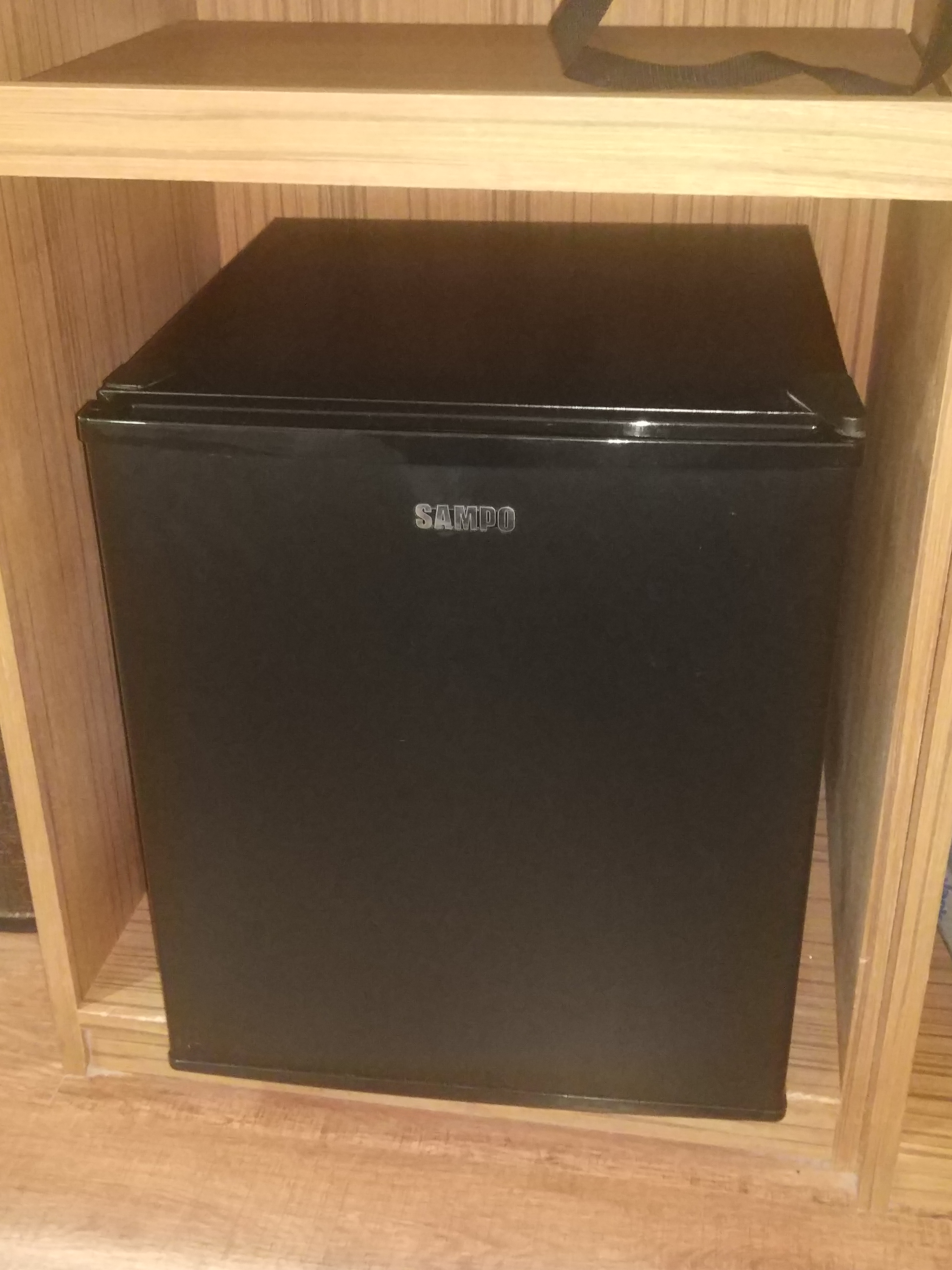 聲寶小冰箱